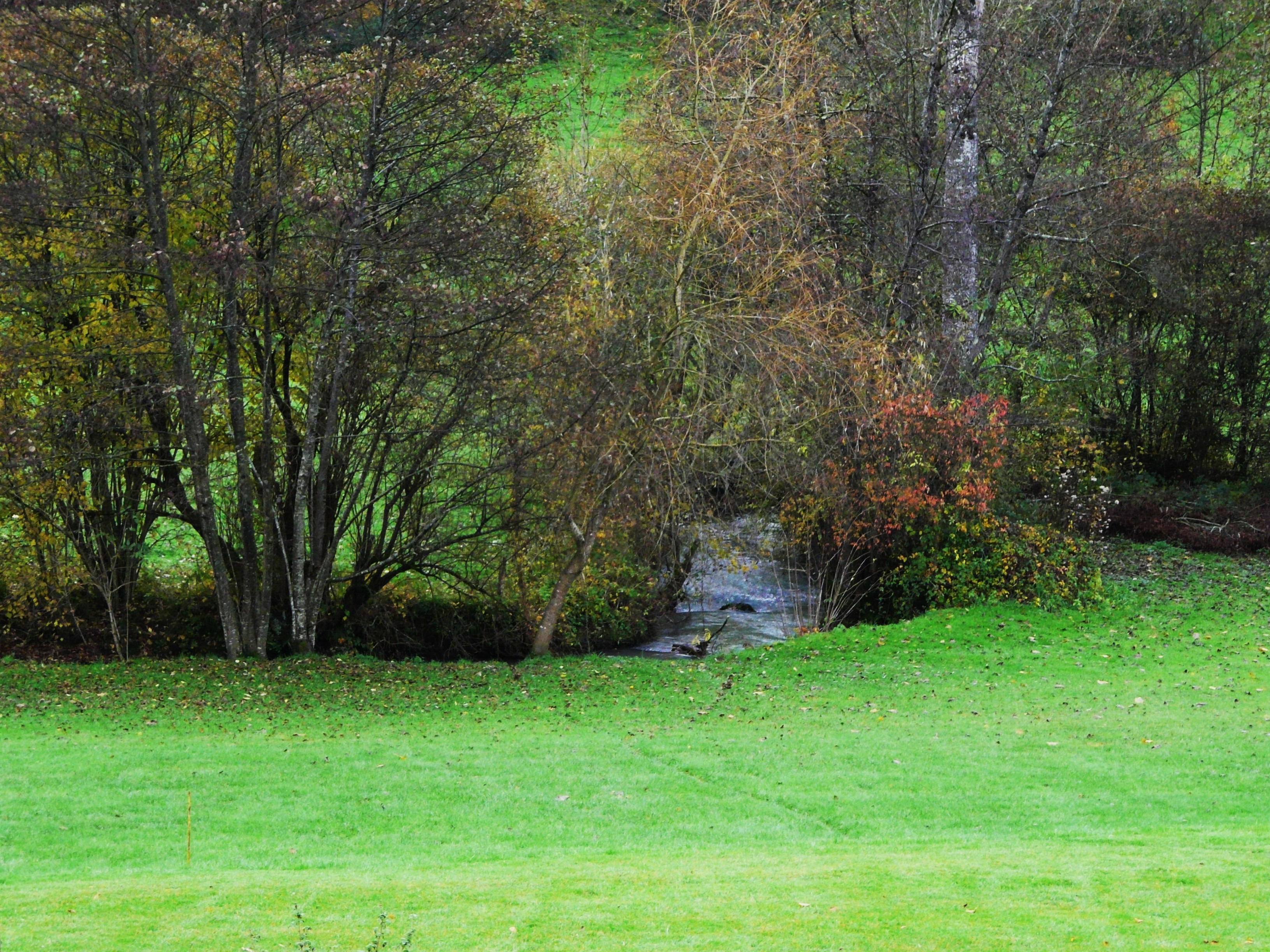 Le ruisseau de Varaignes vu depuis la départementale 90, Varaignes, Dordogne, France